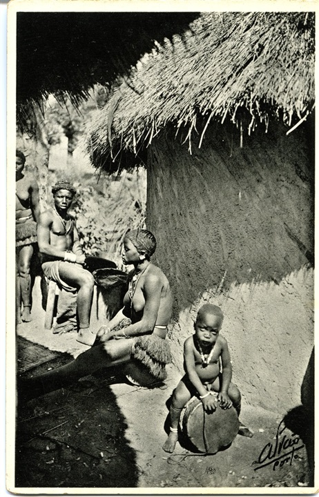 Postal da Guiné-Bissau